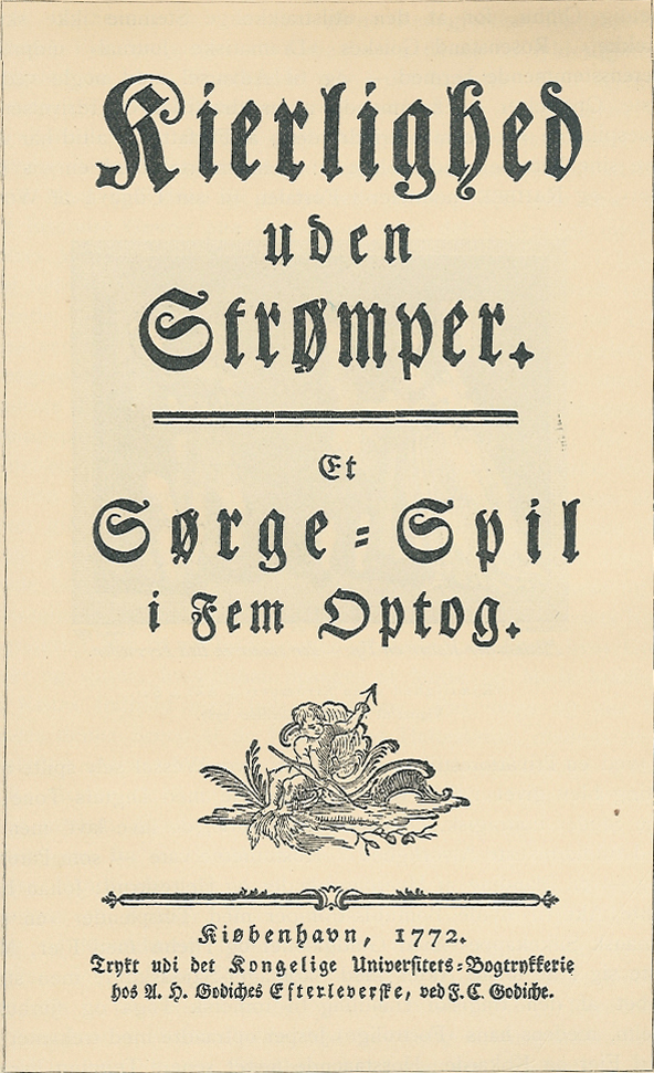 Titelbladet til første udgaven af Johan Hermann Wessels "Kærlighed uden strømper" fra 1772.